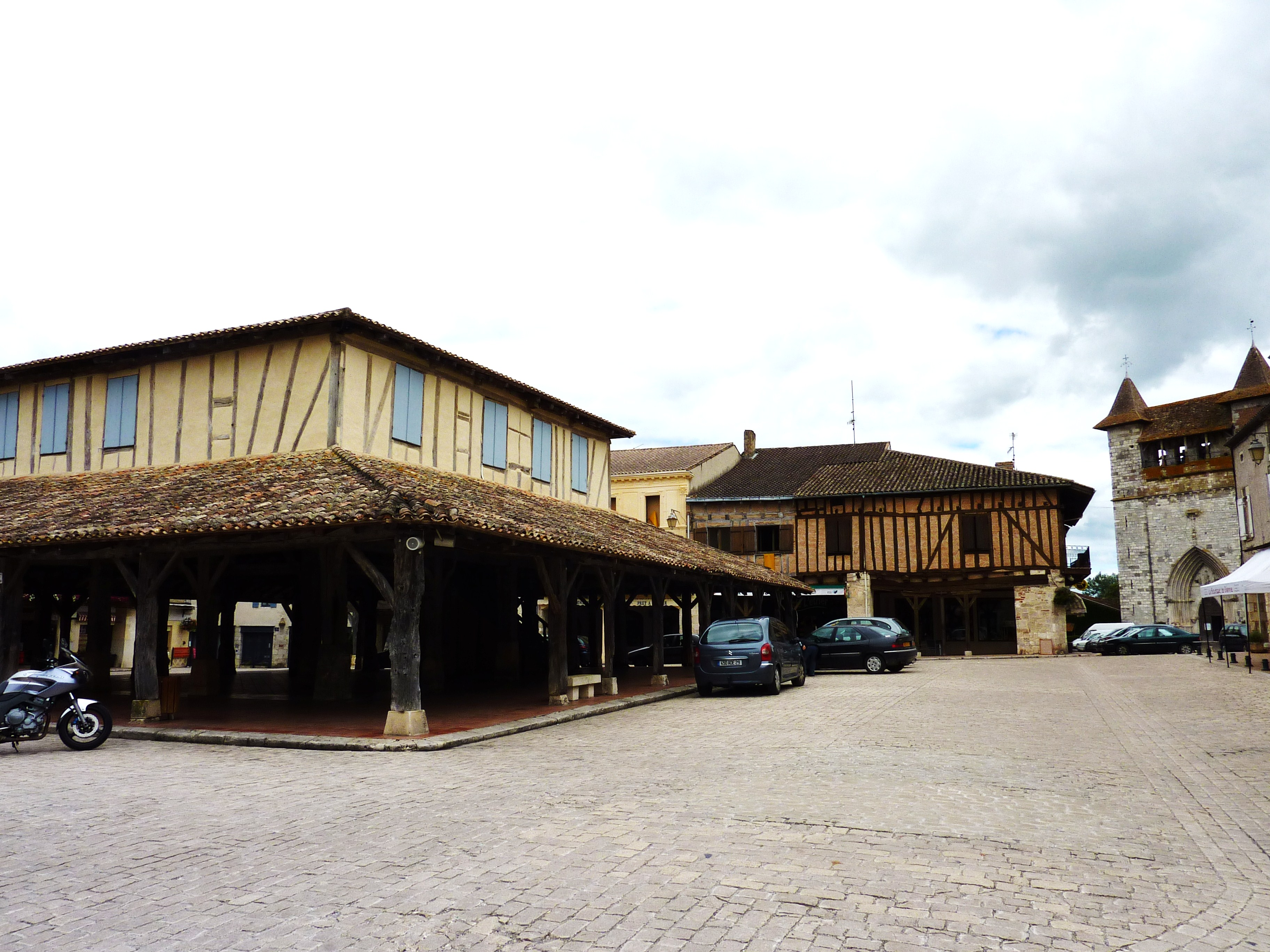 Halles, église et maison à colombages de la bastide de Villeréal